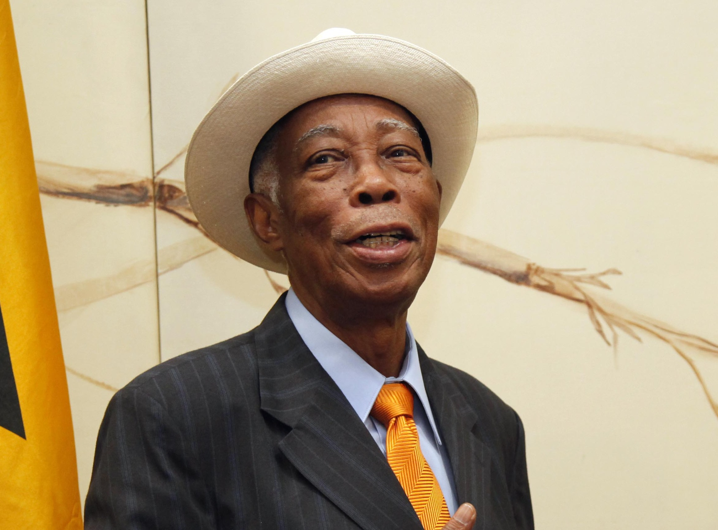 Kingston (Jamaica), 18 de Diciembre del 2012. Canciller Ricardo Patiño se reunión con su homólogo jamaicano Arnold J. Nicholson.